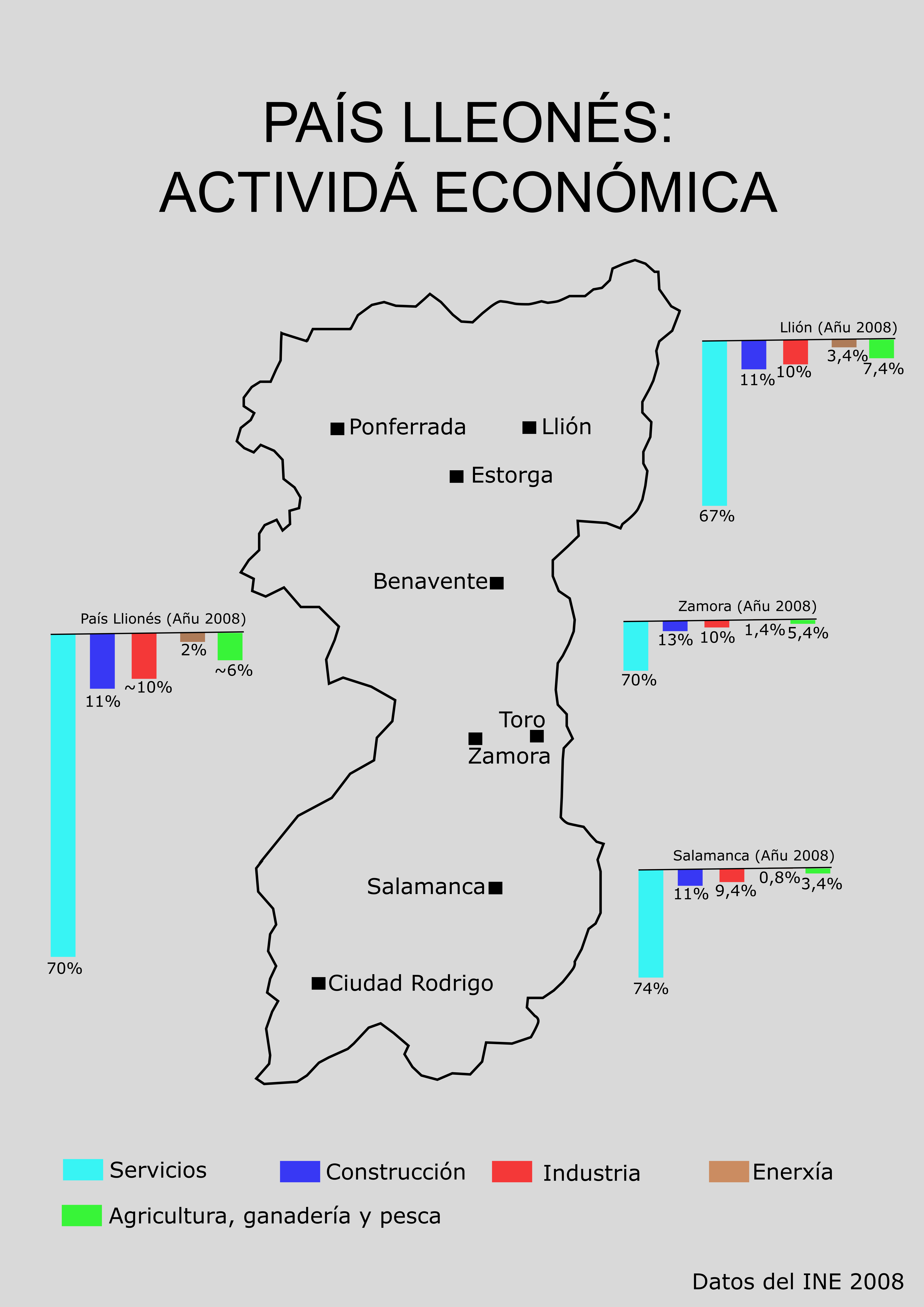 Actividá económica na Rexón Lleonesa.